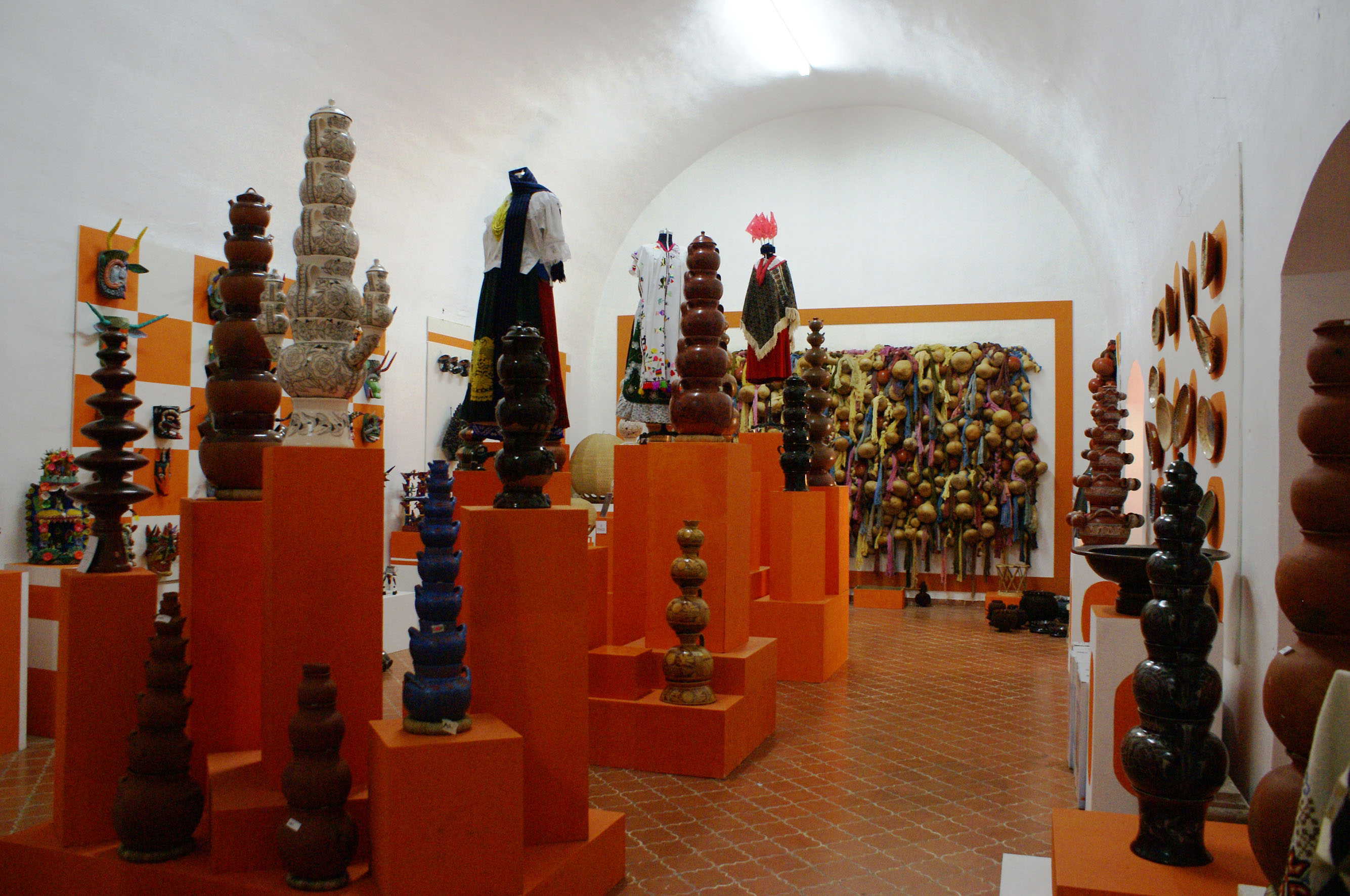 Casa de las Artesanías de Michoacán, recinto cultural público ubicado en la ciudad de Morelia, Michoacán, México; enfocado en la conservación y difusión del arte popular de las distintas regiones del estado, tiene su sede en un ex convento del siglo XVI.